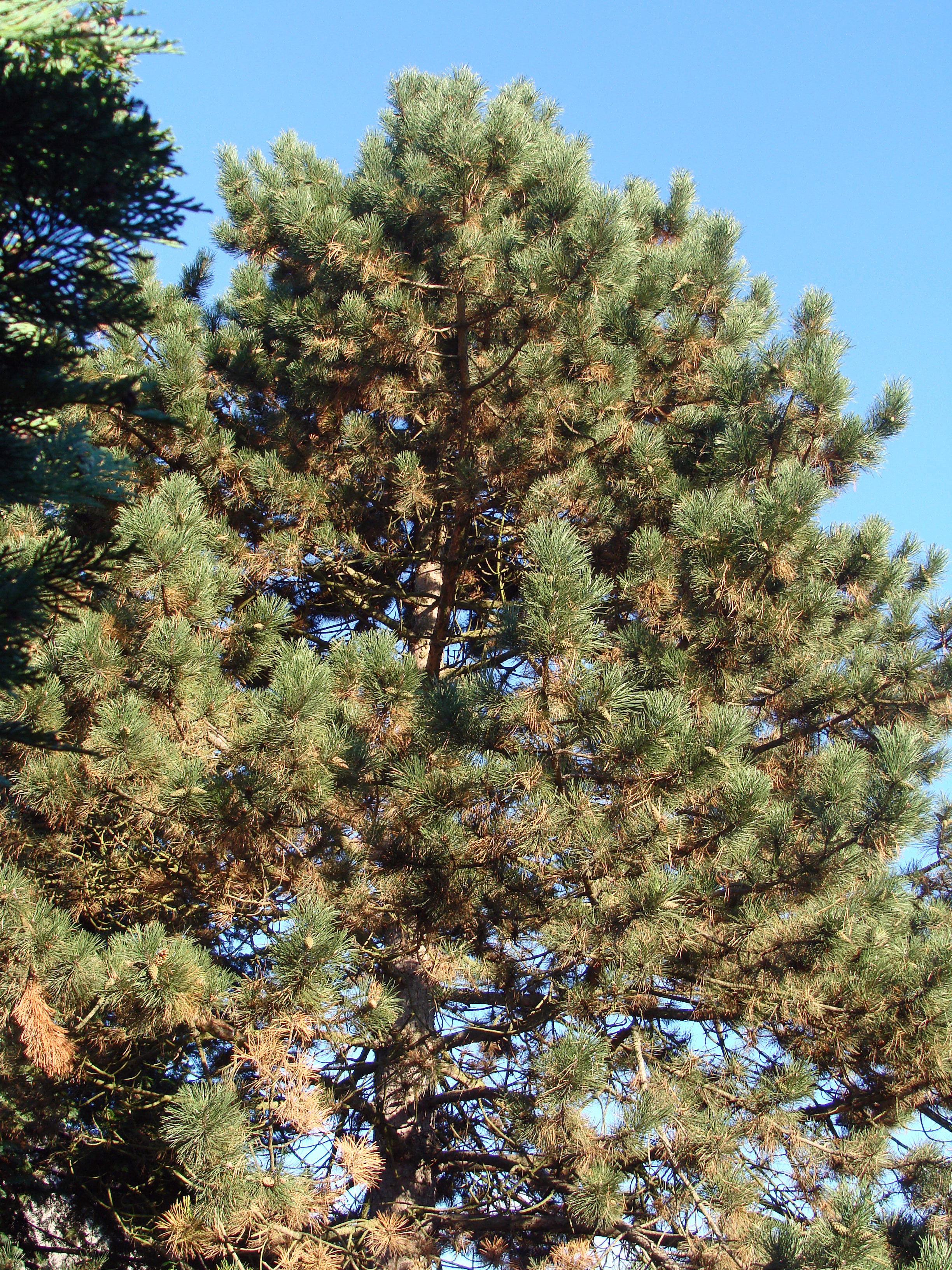 Pin noir d'Autriche (Pinus nigra) à L'Hôpital (Moselle) rue de Carling en octobre 2013.